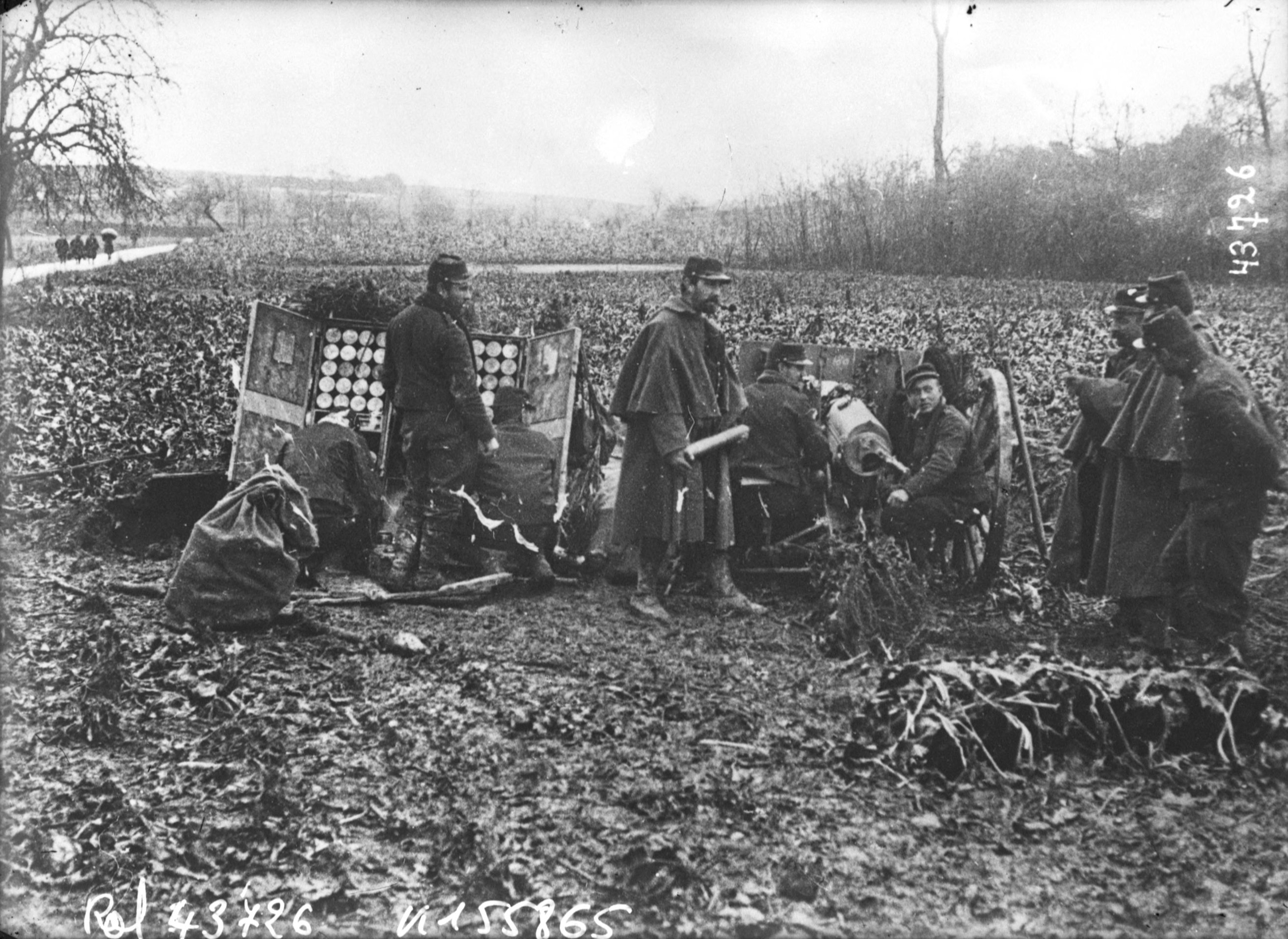 Batterie de 75 en action [tir de canon] : [photographie de presse] / [Agence Rol].